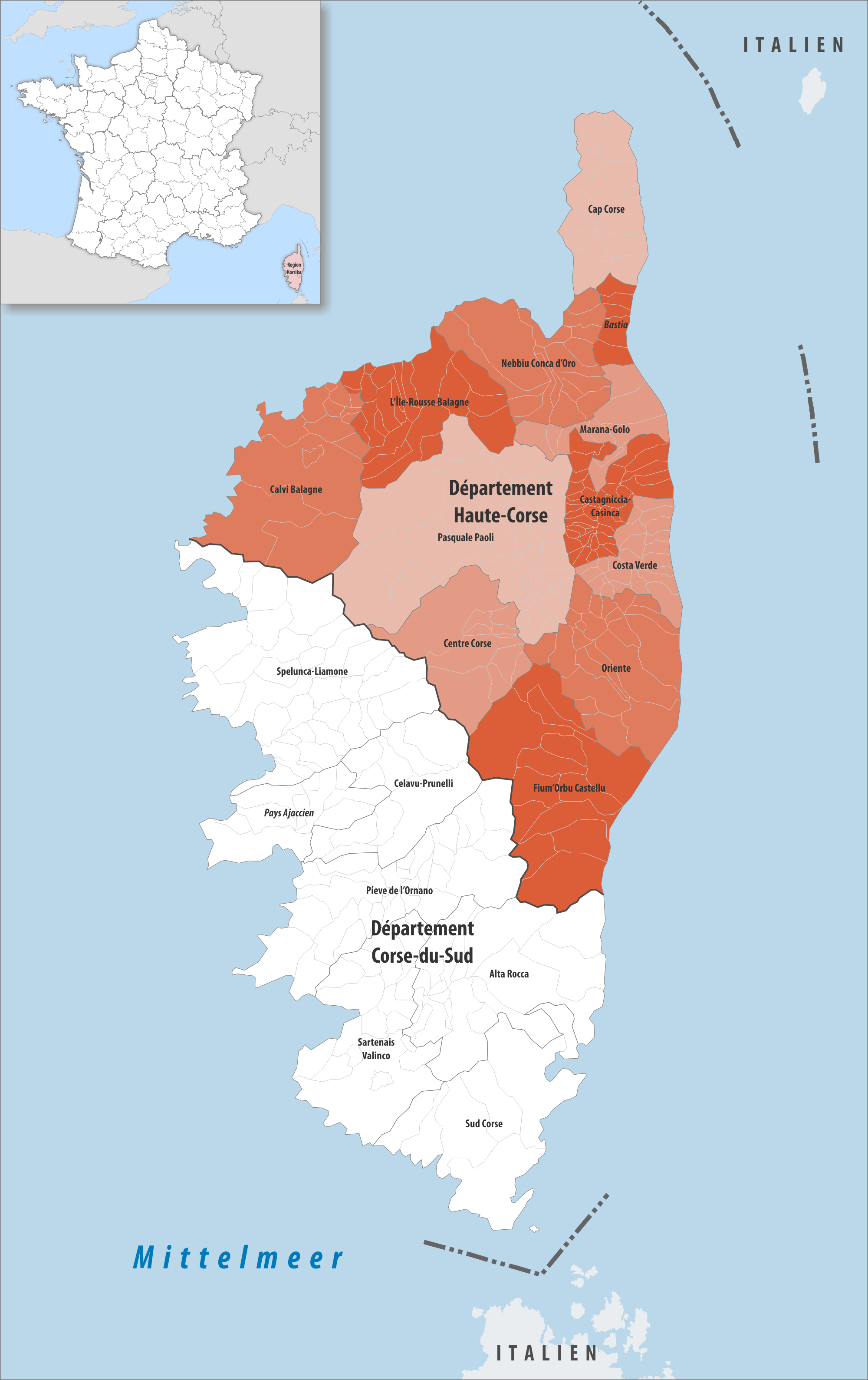 Gemeindeverbände im Département Haute-Corse